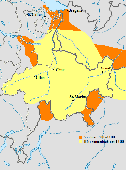 Sprachkarte des rätoromanischen Sprachgebietes zwischen 700-1100.